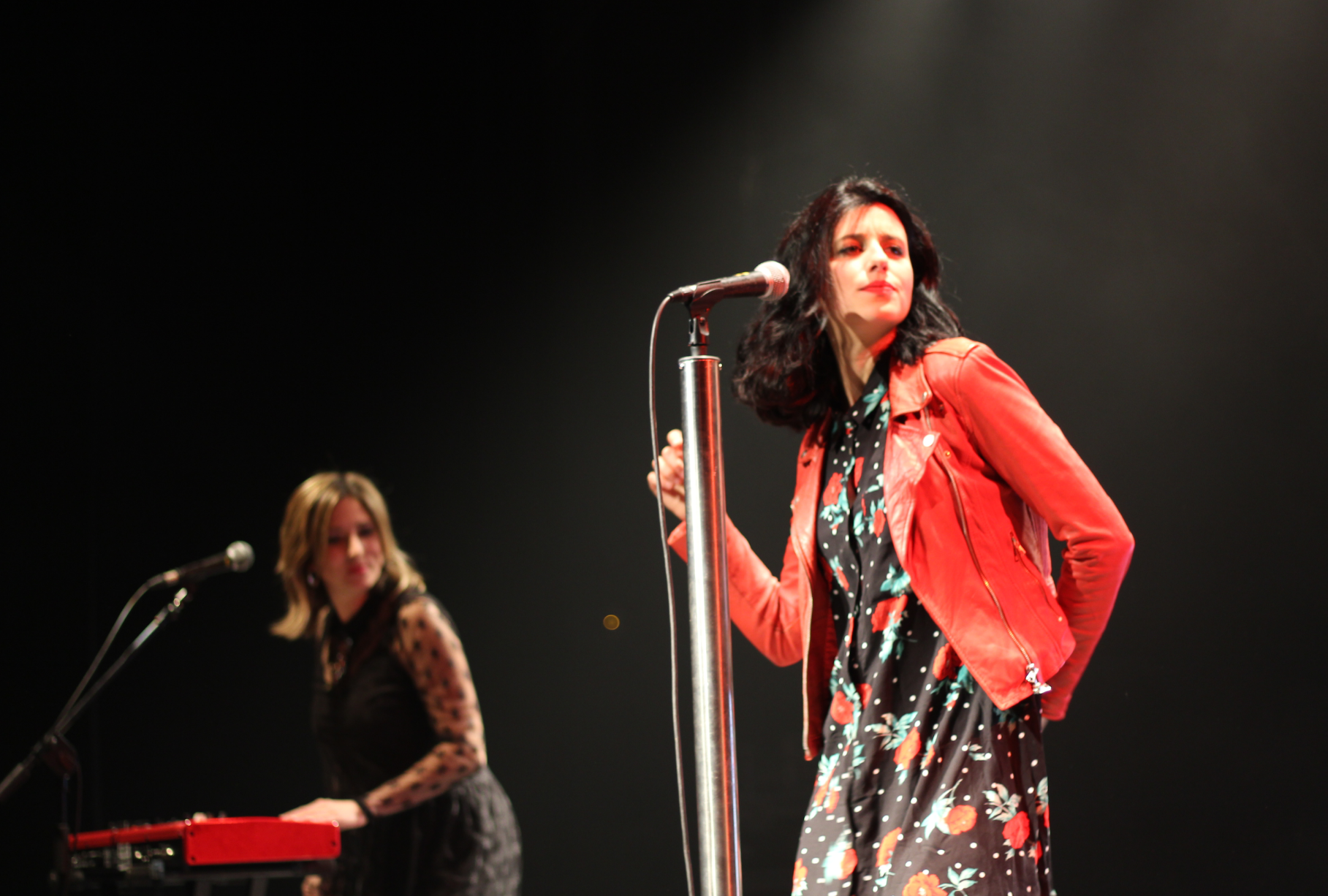 Anita Parker Intxaurrondon (2018-3-10)